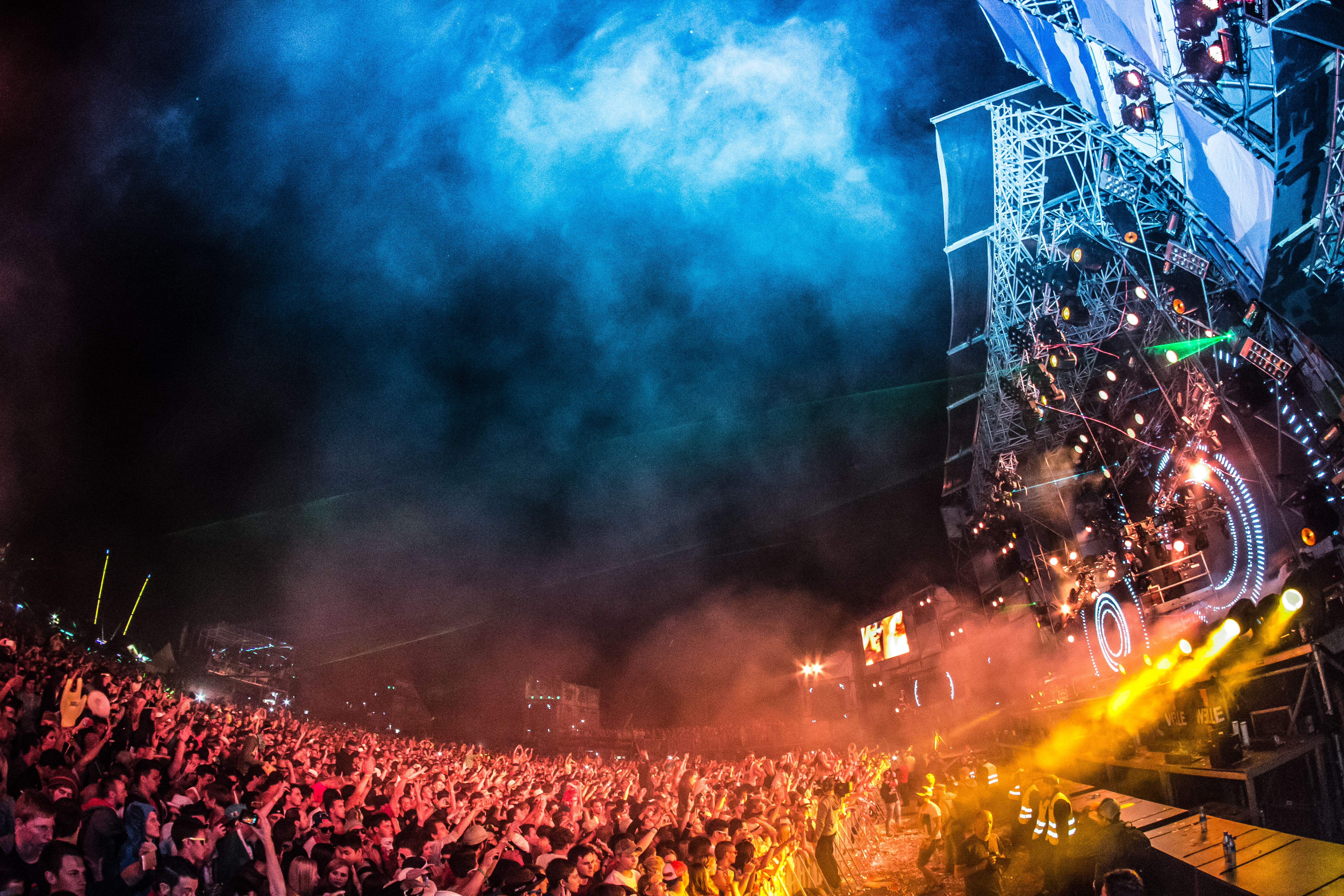 Electric Love 2013